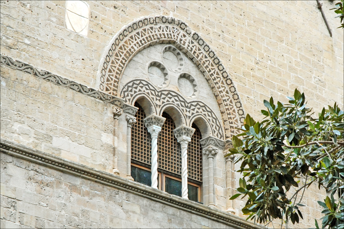 Le palais Chiaramonte O Steri est situé Piazza Marina. Le palais Chiaramonte O Steri a été construit par Manfred de Chiaramonte à partir de 1320, il a eu au cours des siècles de nombreux locataires, il a été notamment le siège de l'Inquisition à partir de 1601. Sa restauration a commencé en 1970, deux célèbres architectes Italiens, Carlo Scarpa et Roberto Calandra y ont contribué. Article de Wikipedia sur la famille Chiaramonte site officiel du palais Site de Palerme